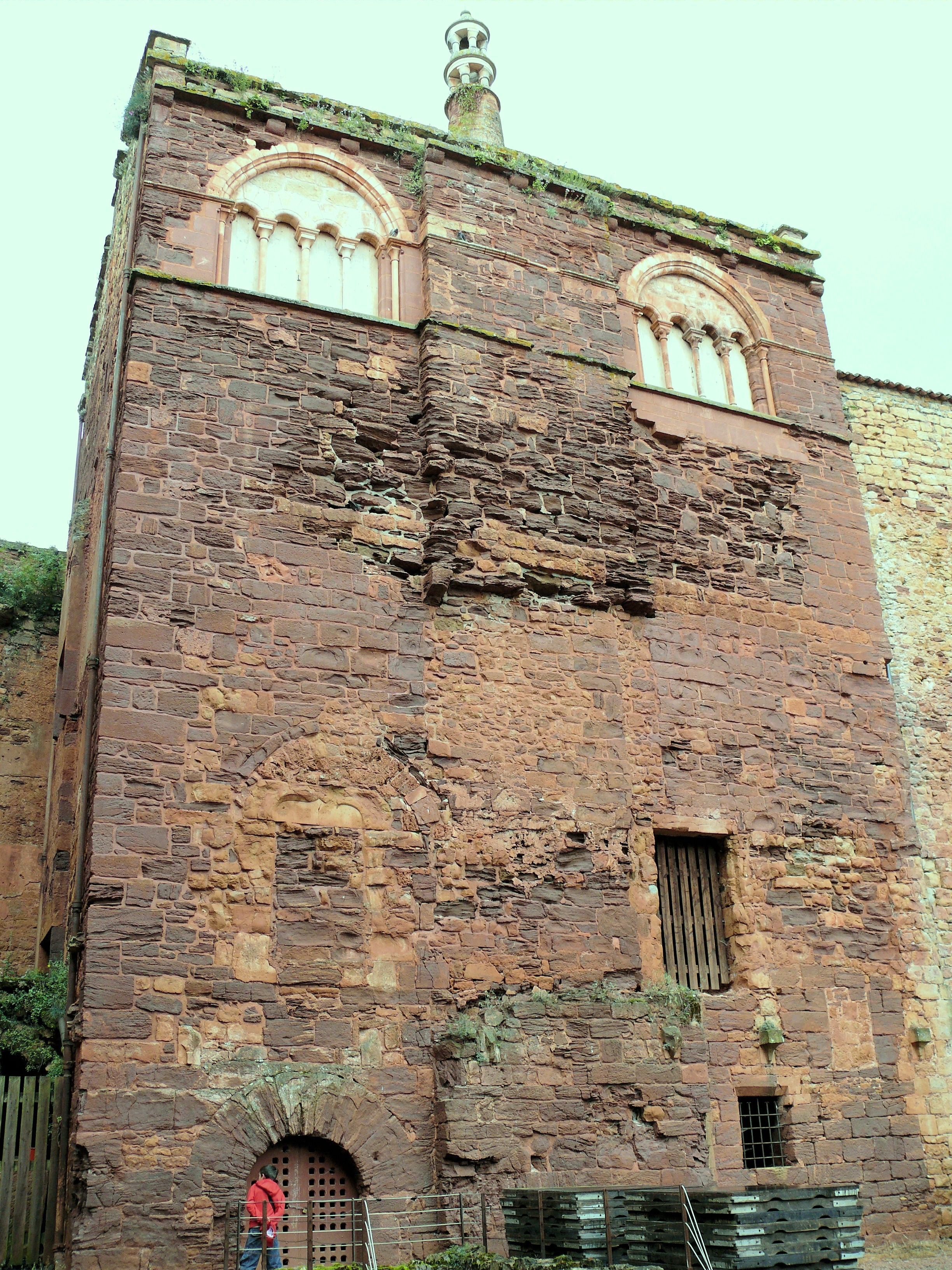 Château de Castelnau-Bretenoux - Tour de l'auditoire